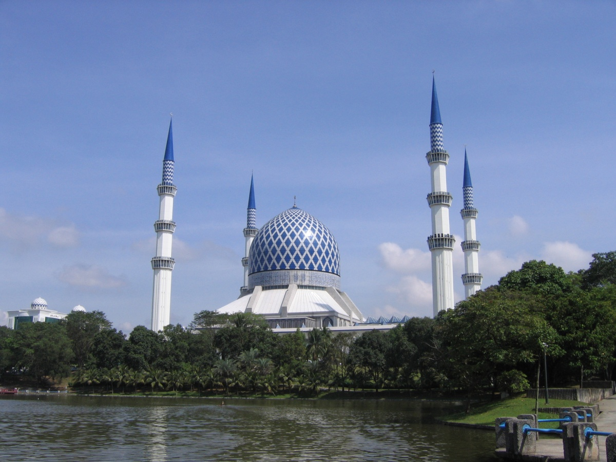 Sultan Salahuddin Mosque or Blue Mosque in Shah Alam, Selangor, Malaysia.